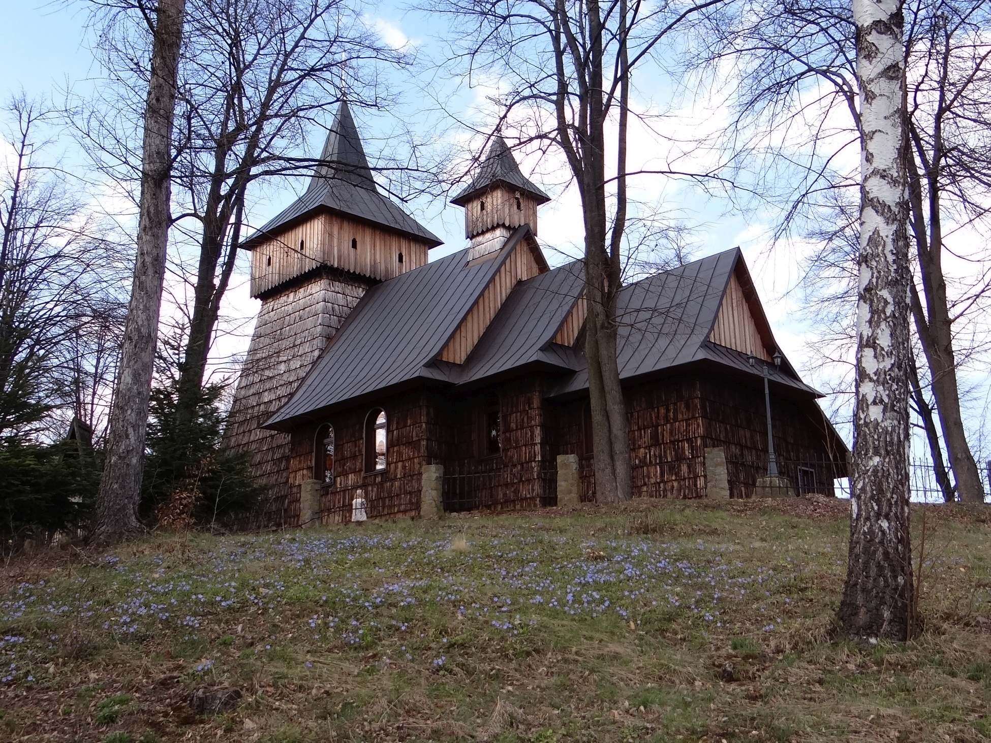 Bukowiec - rzymskokatolicki kościół parafialny pw. Niepokalanego Serca Najświętszej Maryi Panny